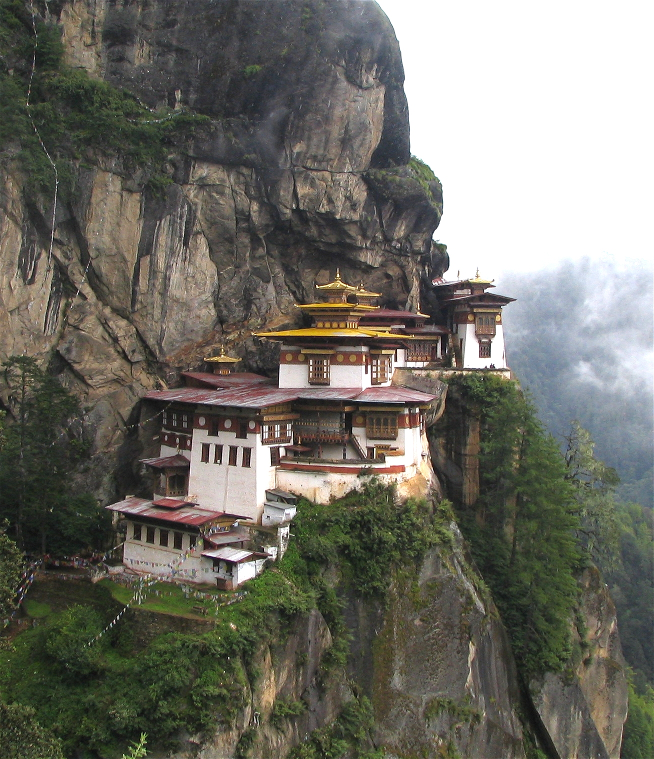 Taktshang Monastery, Bhutan